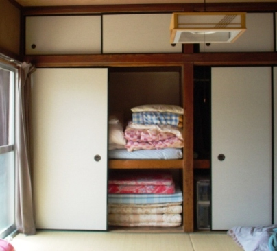 cliché personnel.